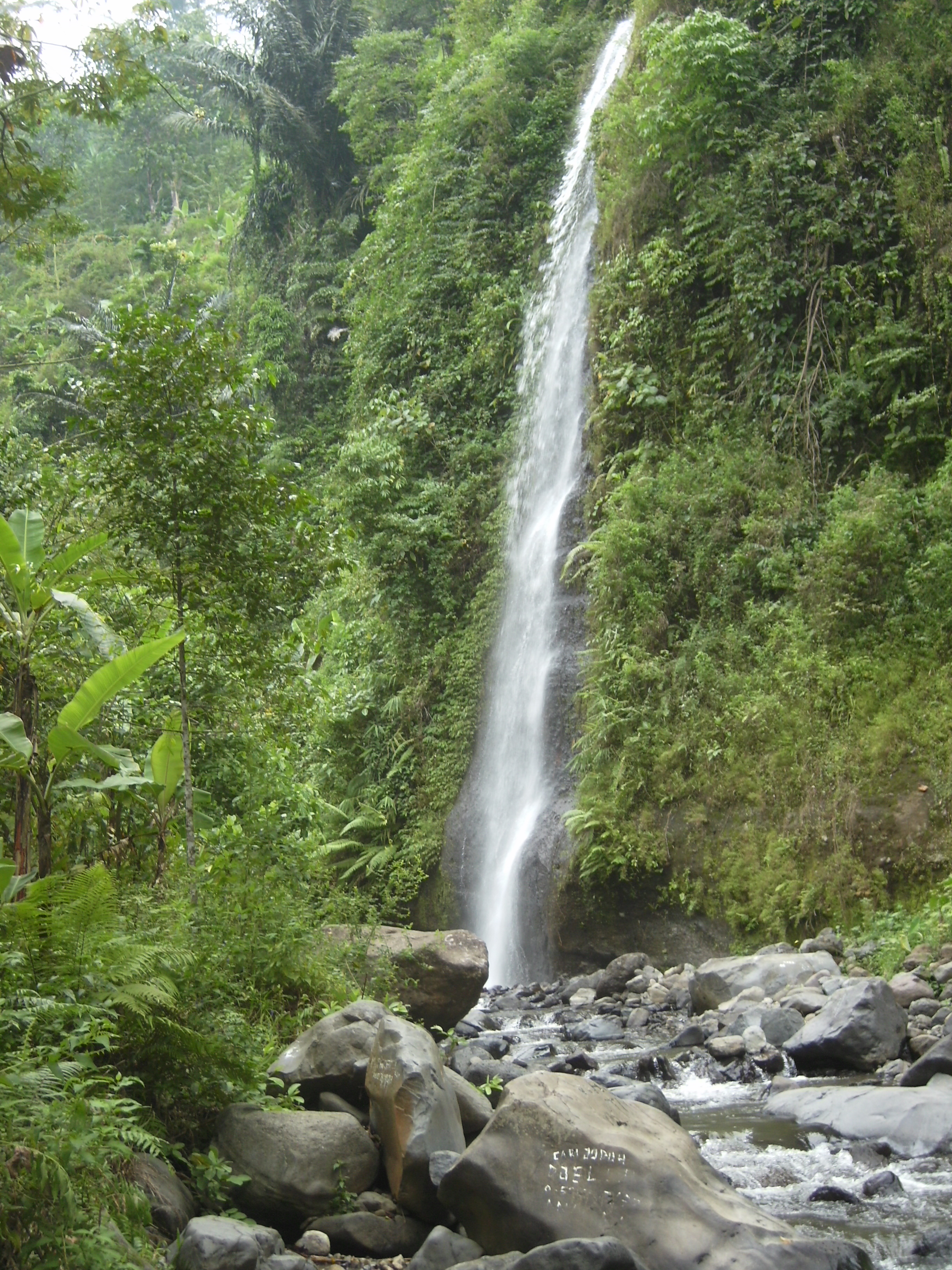 Salah satu air terjun Santi yang disebut Tretes di Tlogowungu Kabupaten Pati Jawa Tengah Indonesia